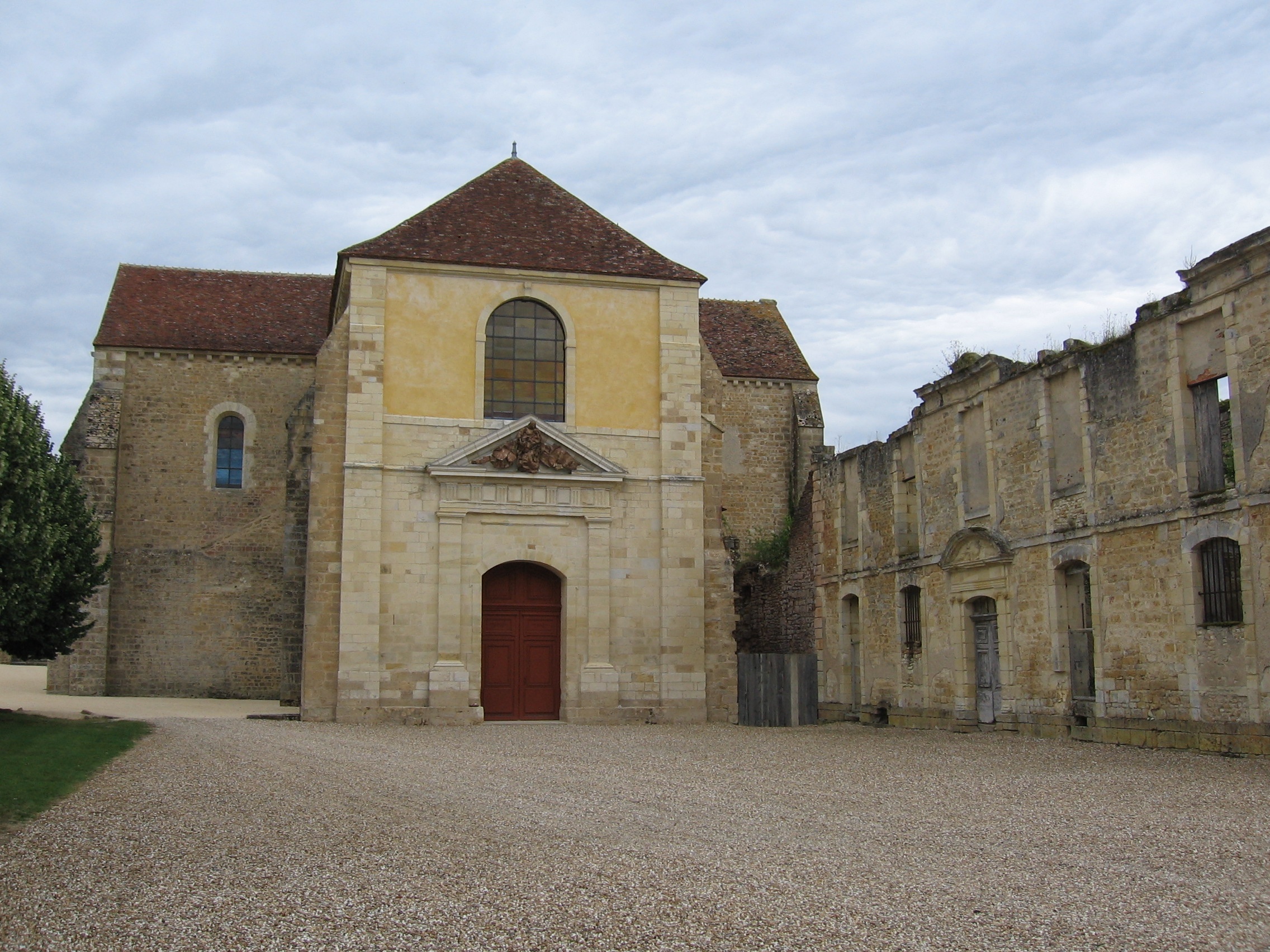 Église et palais abbatial de l'ancienne abbaye de Fontmorigny, aujourd'hui un centre culturel